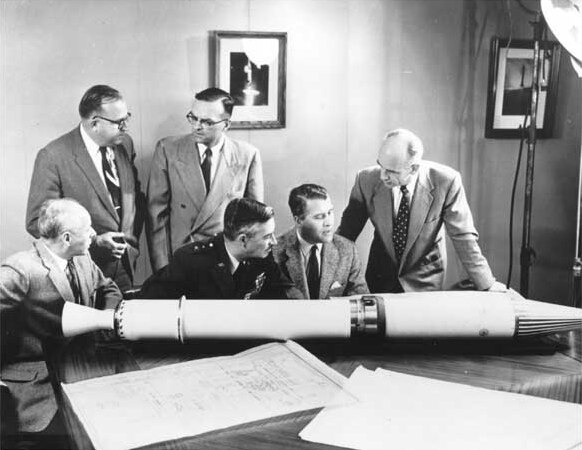 EXPLORER I briefing